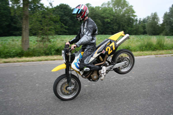 Stoppie w/ Husqvarna 610 SM 2000